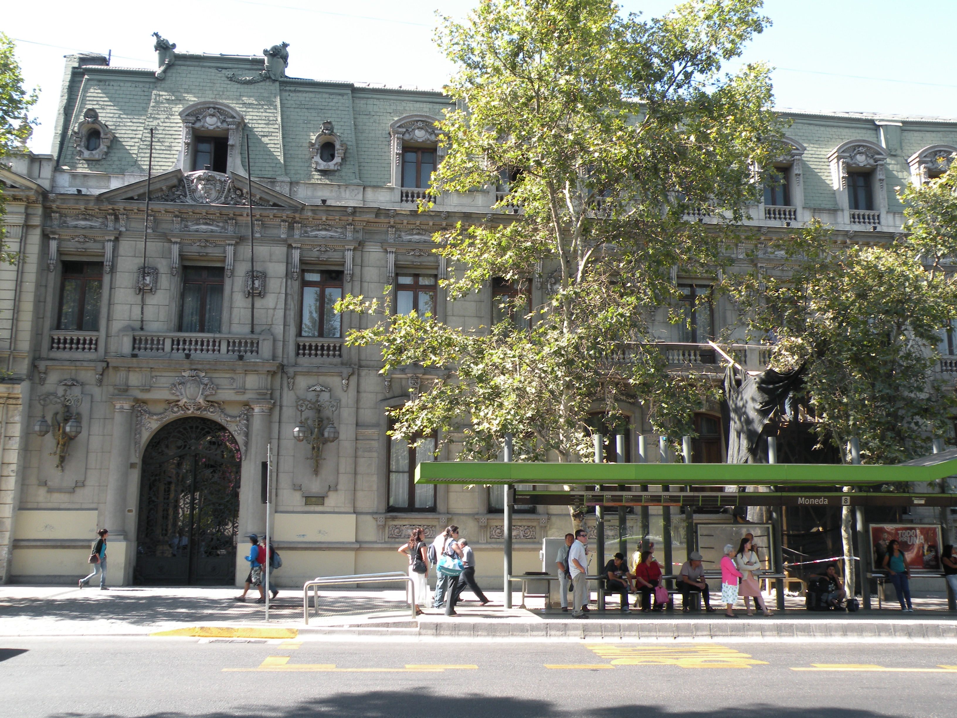 Palacio Irarrázabal, ubicado en la Alameda, entre el Palacio Íñiguez y el Palacio Ochagavía.